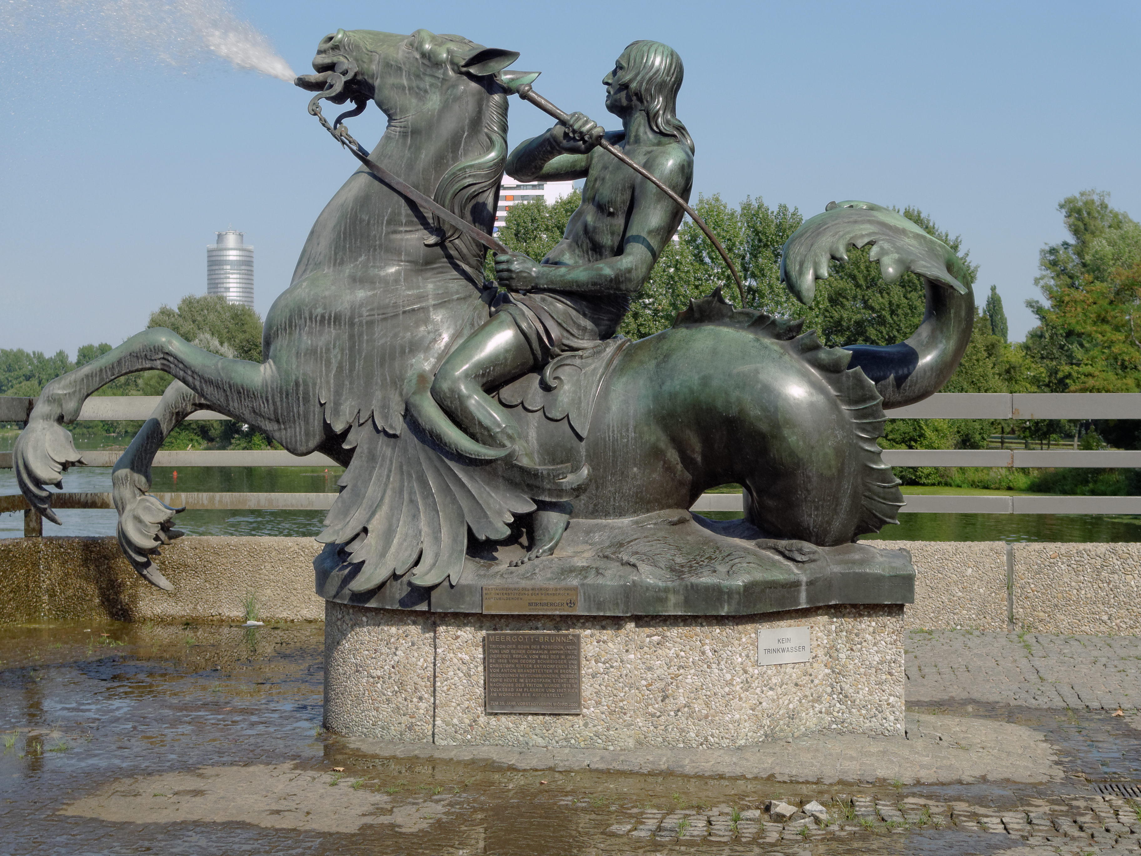 Der Meergottbrunnen am westlichen Ende des Wöhrder Sees in Nürnberg